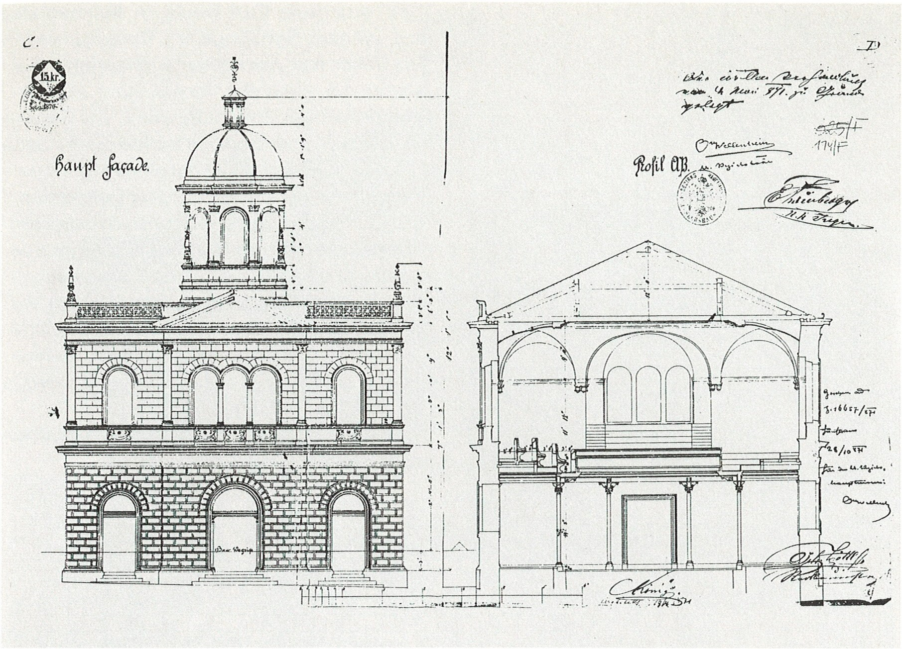 Die Synagoge in der Turnergasse, Bauplan von Prof. Carl König.